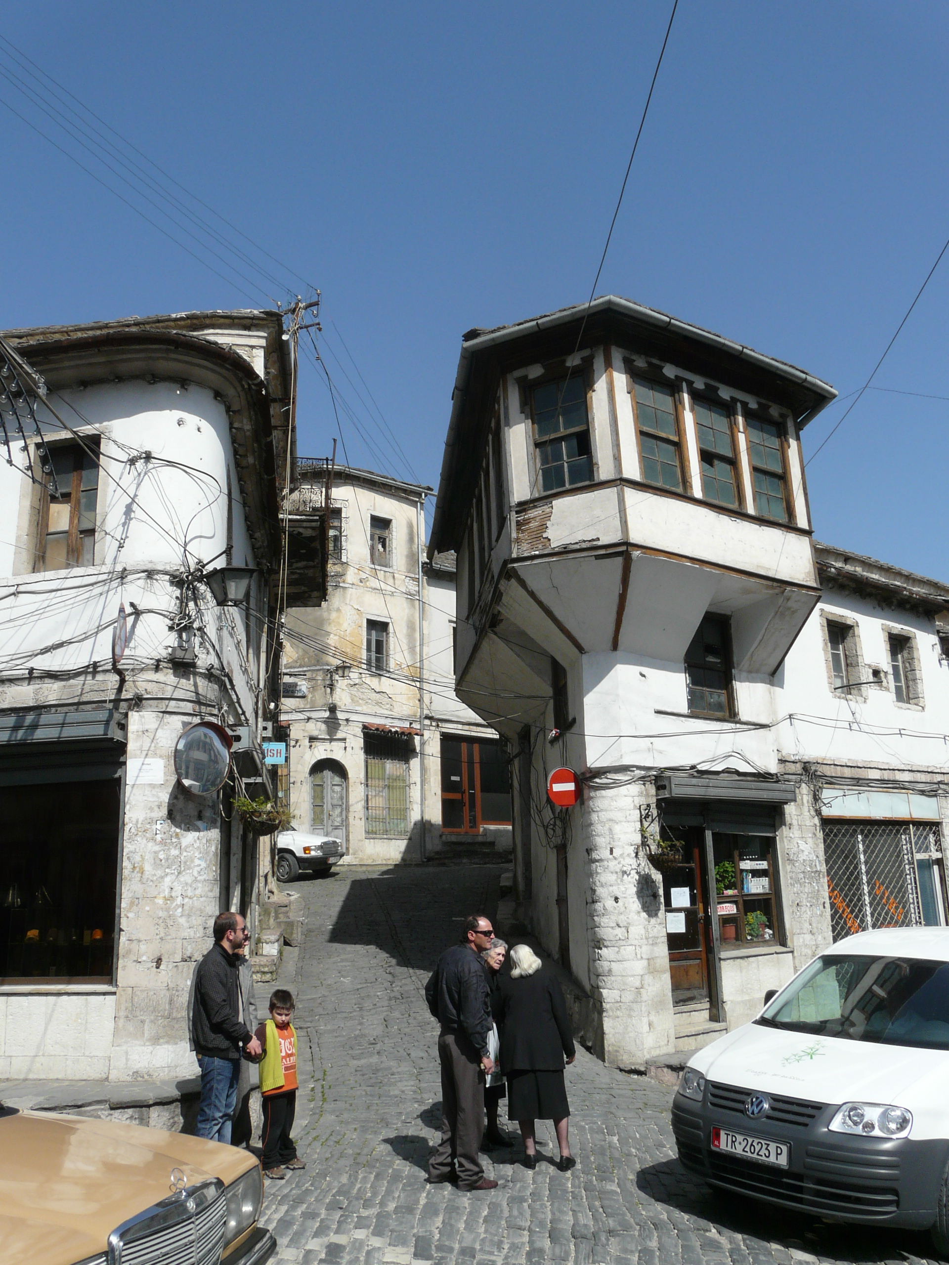 Gjirokastër